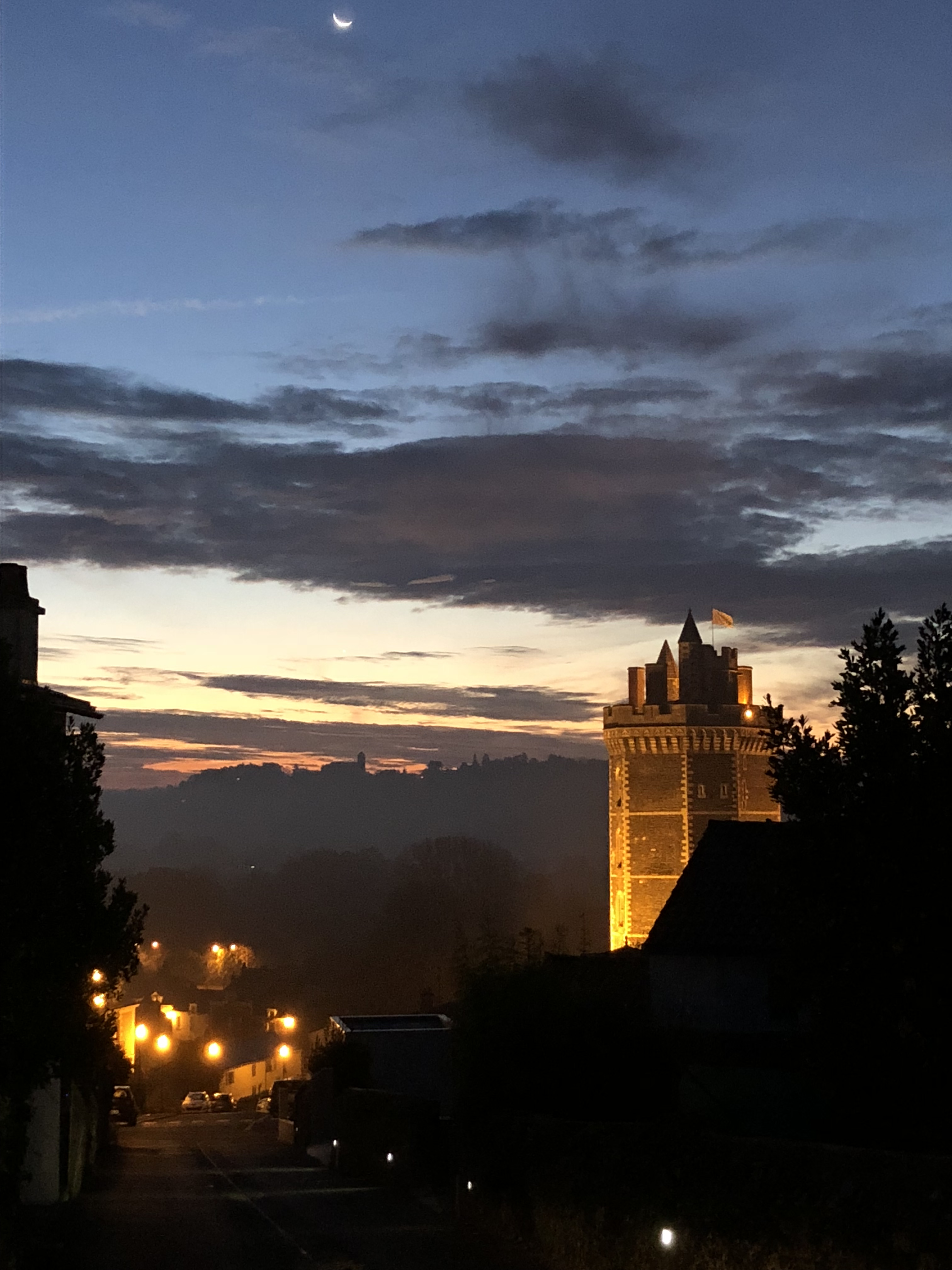 La tour d'Oudon au levé du soleil, Loire Atlantique, Vallée de la Loire.